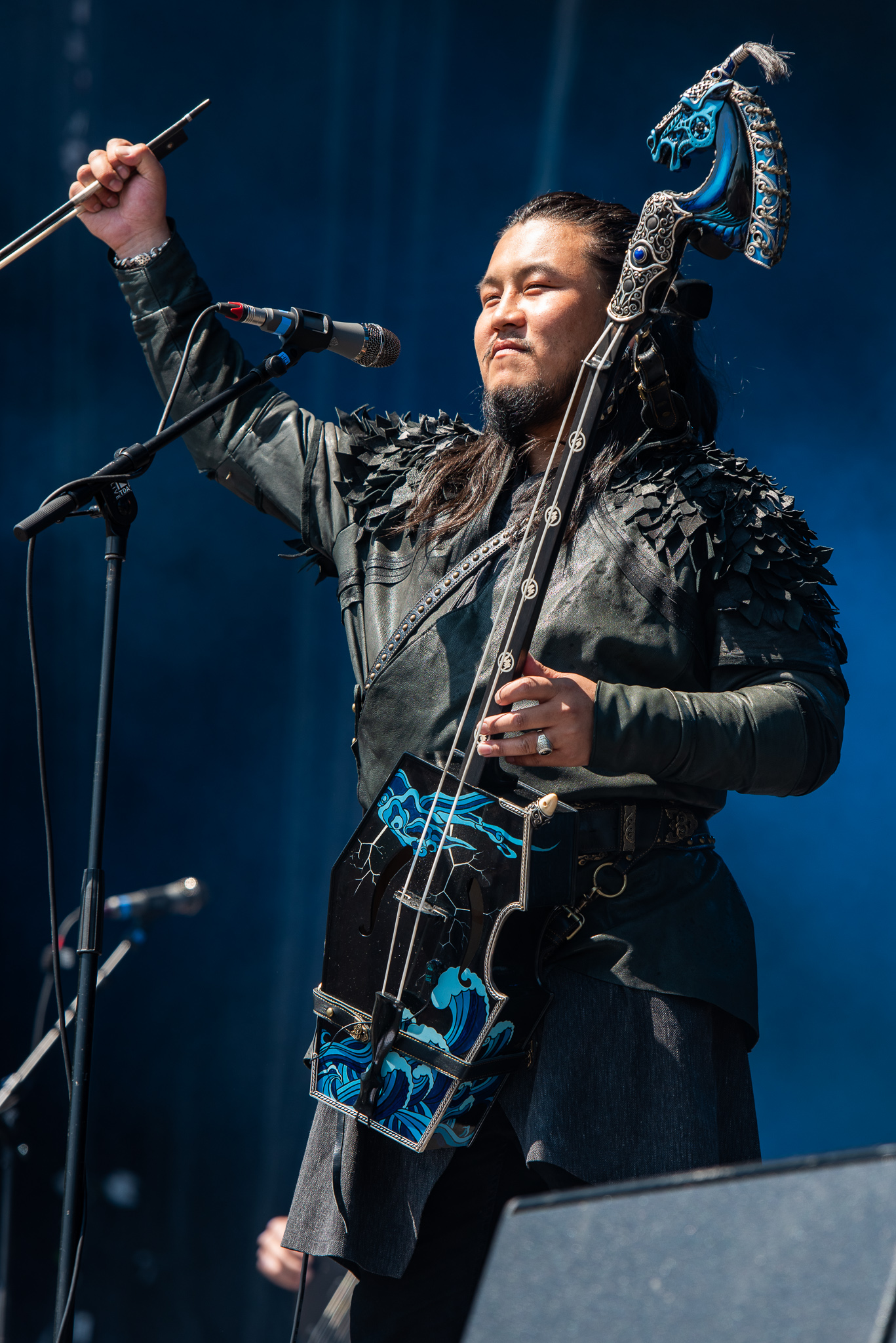 ARGO-Konzerte,Beck's Park Stage,Konzert,Livekonzert,Livemusik,Musik,RiP,Rock im Park 2019,The Hu